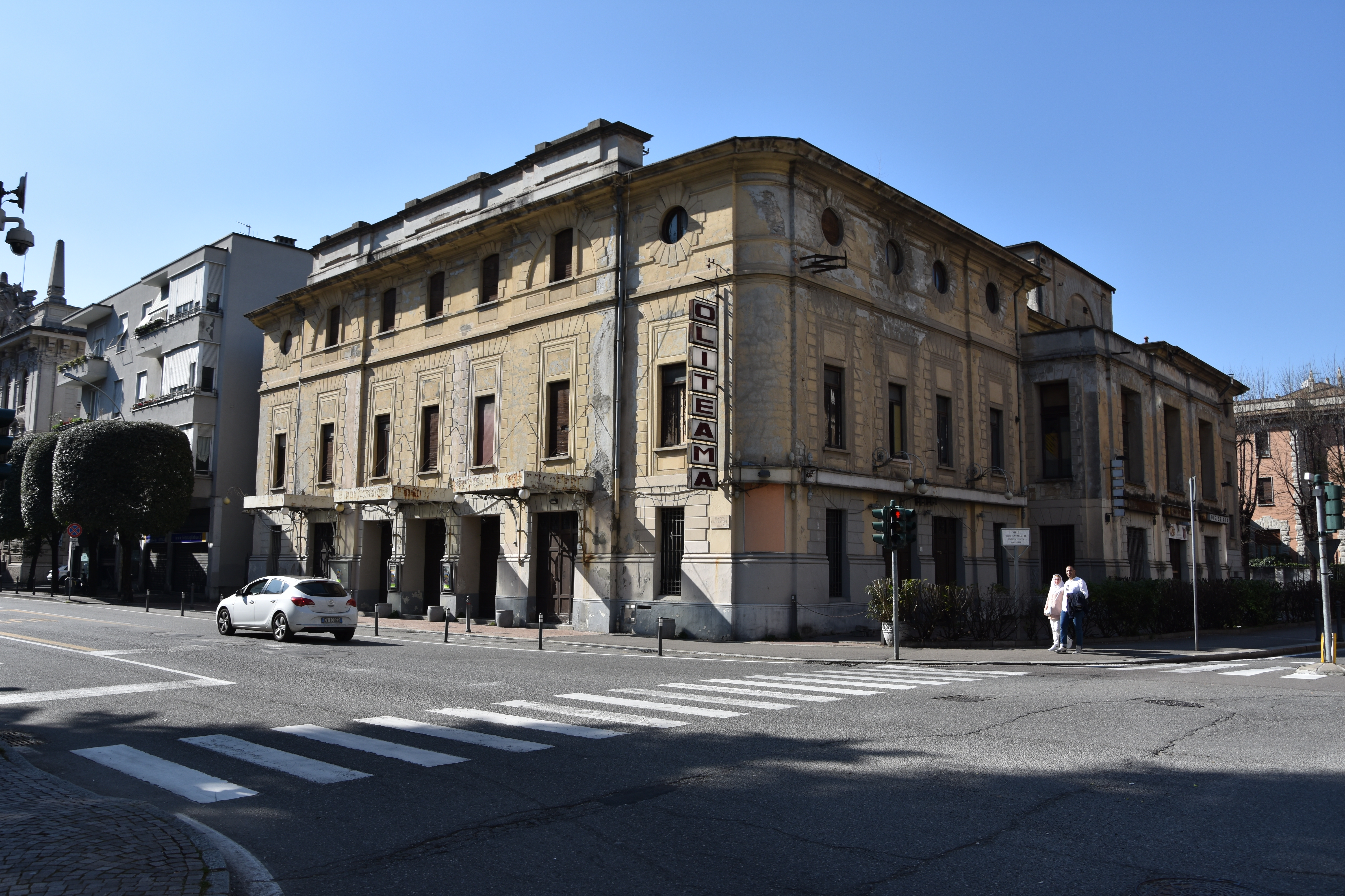 Il Teatro Politeama di Como, ex cinema e teatro, in stato di abbandono nel 2019.